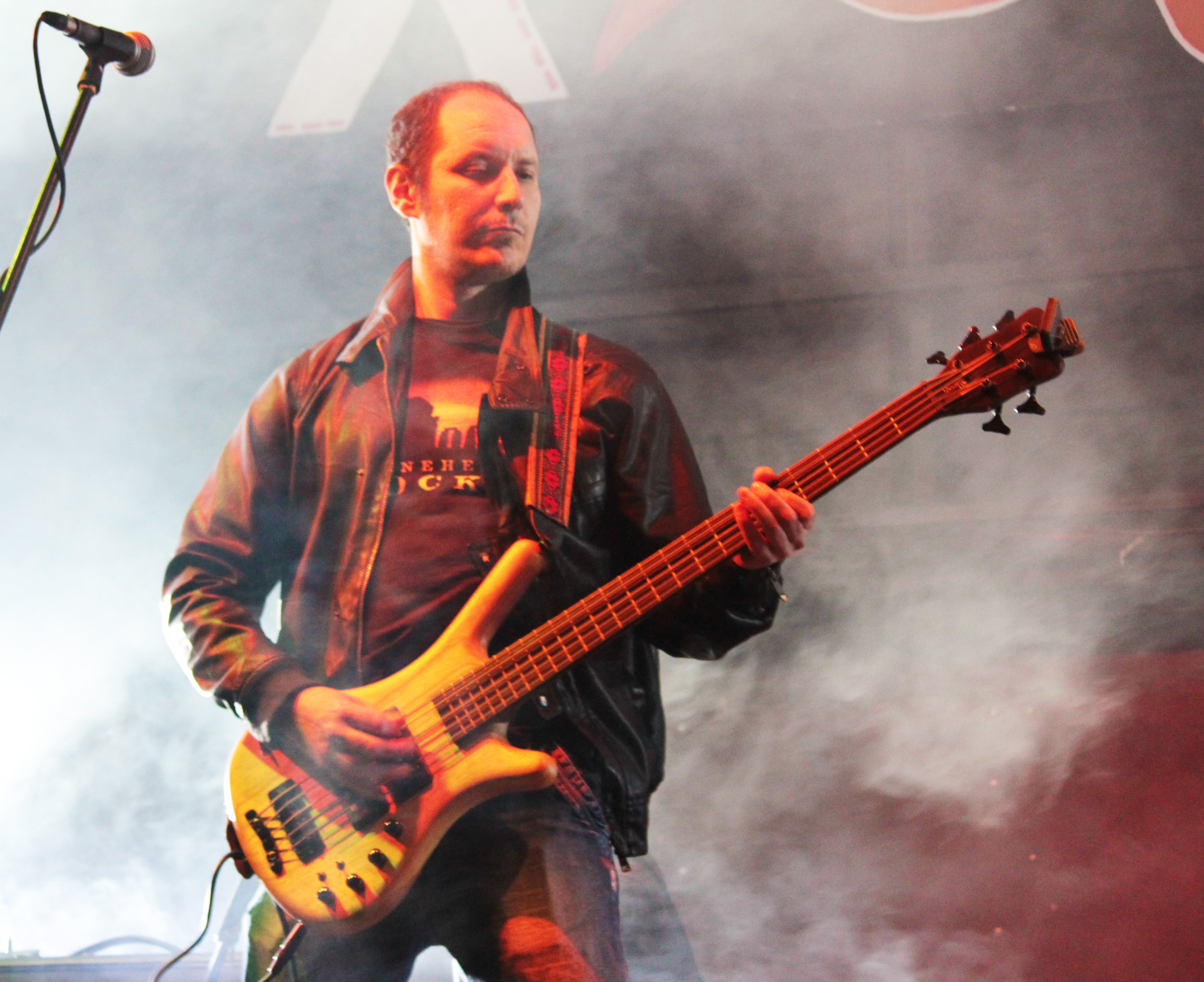 El bajista Diego Sánchez Zamora en festival Guman de Guareña con la banda Stream el 30 de abril de 2012